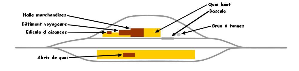 Plan de voie type d'une gare du Réseau Breton